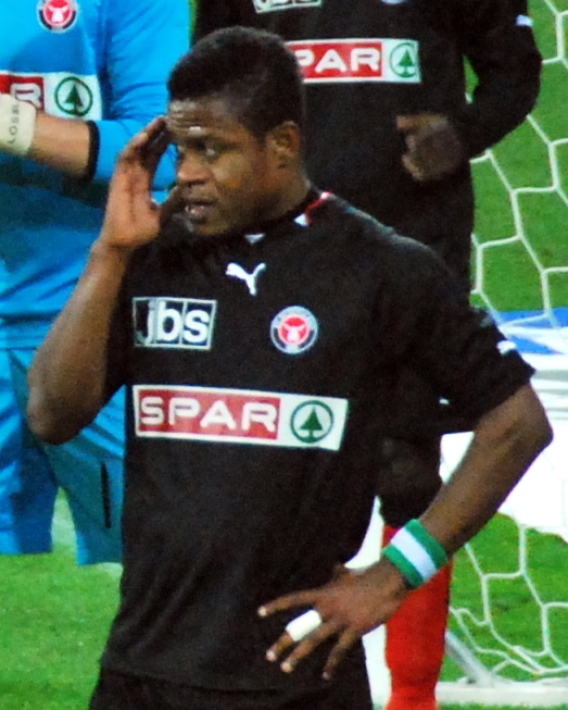 Fodboldspilleren Izunna Uzochukwu fra FC Midtjylland. Her i en superligakamp mod AC Horsens på MCH Arena i Herning.